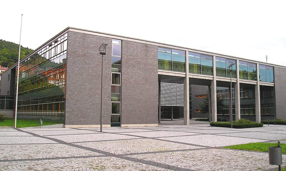 Justizzentrum Meiningen: Amtsgerichtsgebäude mit Schwurgerichtssaal